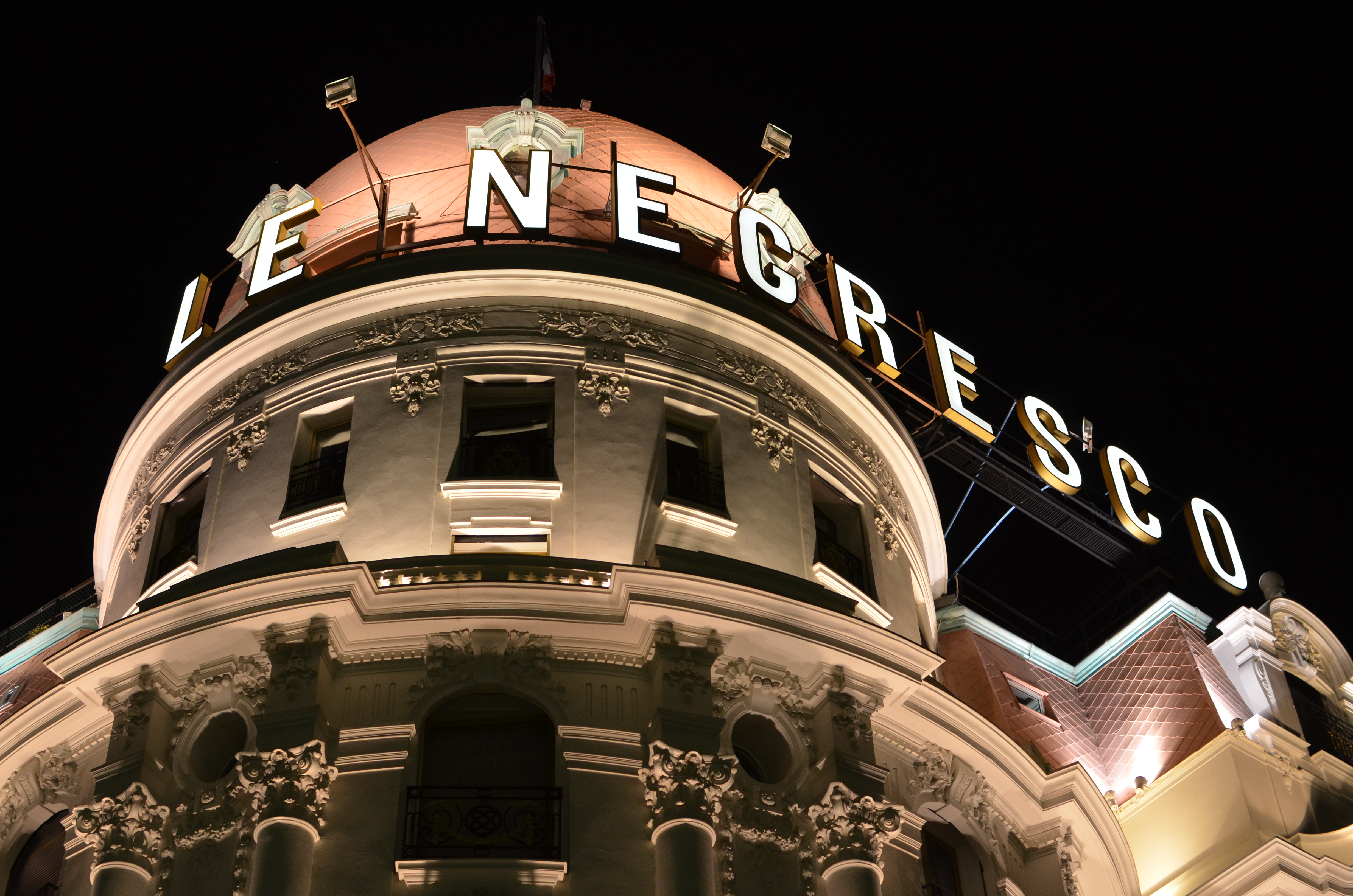 Facade de l'hôtel Le Negresco à Nice